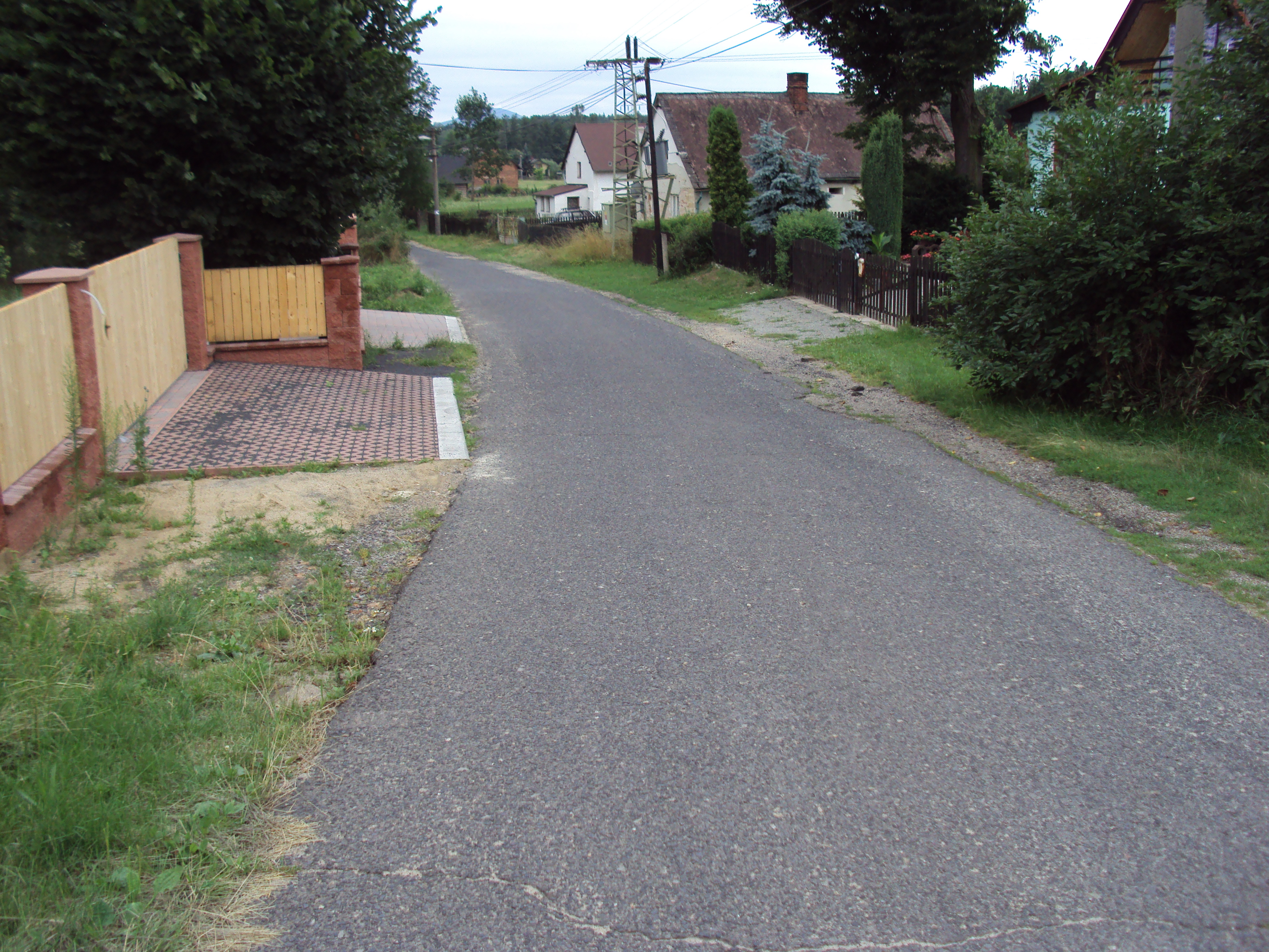 Vesnice Vítkov je součást České Lípy, ulice středem